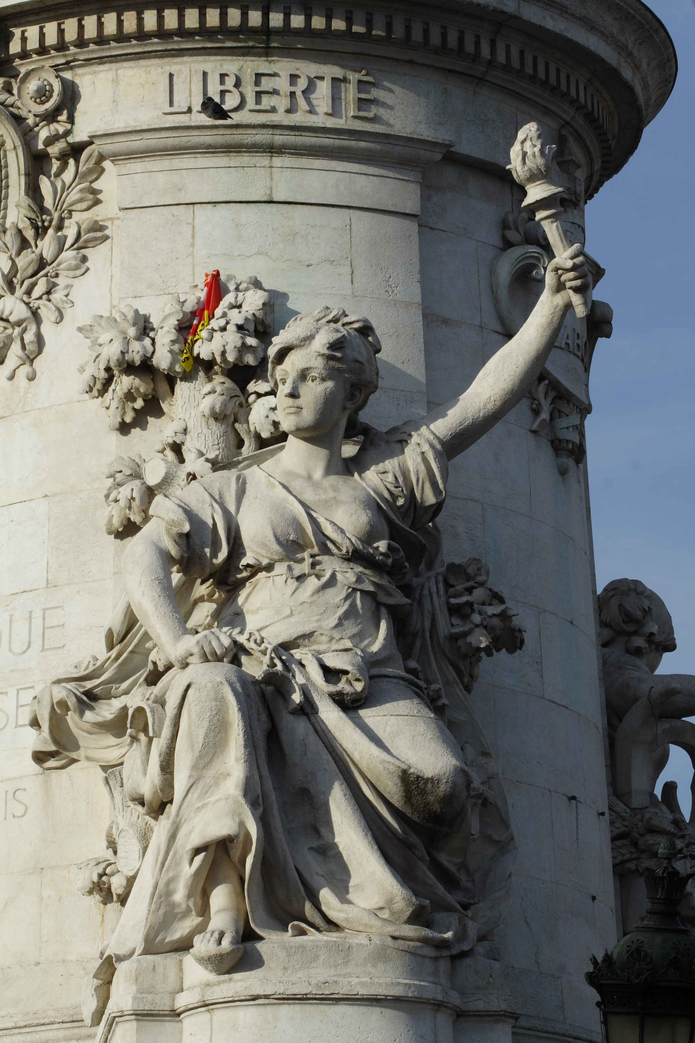 Détail du Monument à la République des frères Morice, au centre de la Place de la République, Paris. Allégorie de la Liberté.